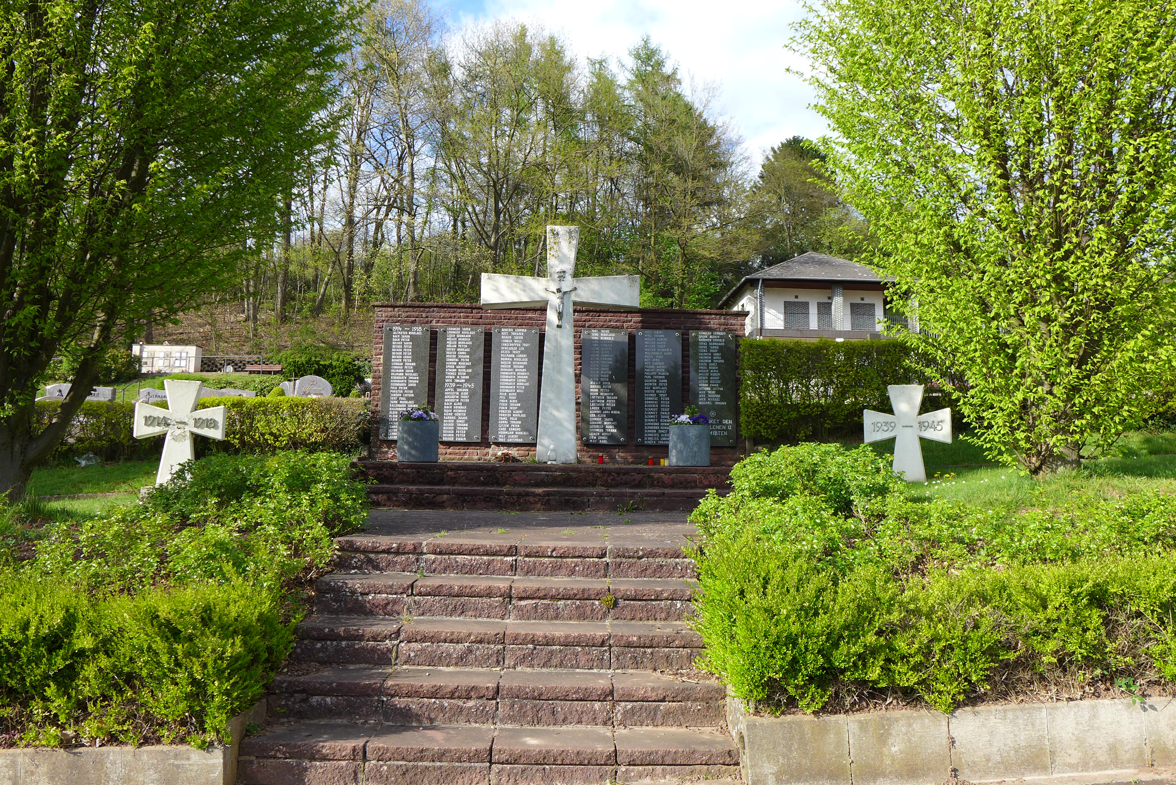 Piesbach, Kriegergedenkstätte